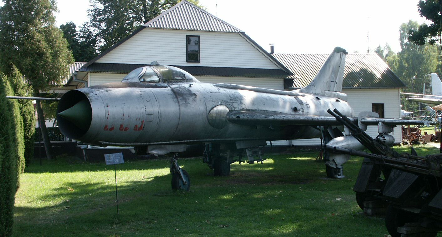 Su-7BKL fighter-bomber in Muzeum Orla Bialego (White Eagle Museum) in Skarzysko-Kamienna, Poland. (Su-7BKŁ w Muzeum Orła Białego, Skarżysko-Kamienna)